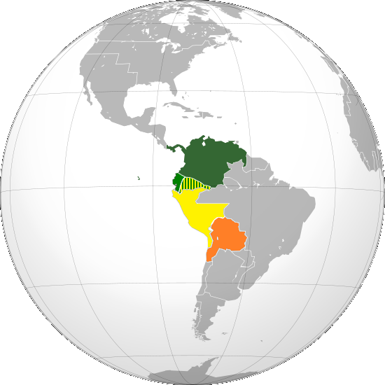 En verde oscuro la Gran Colombia En verde claro los territorios anexado a la Gran Colombia En amarillo los territorios liberados En naranja los territorios liberados-asociados